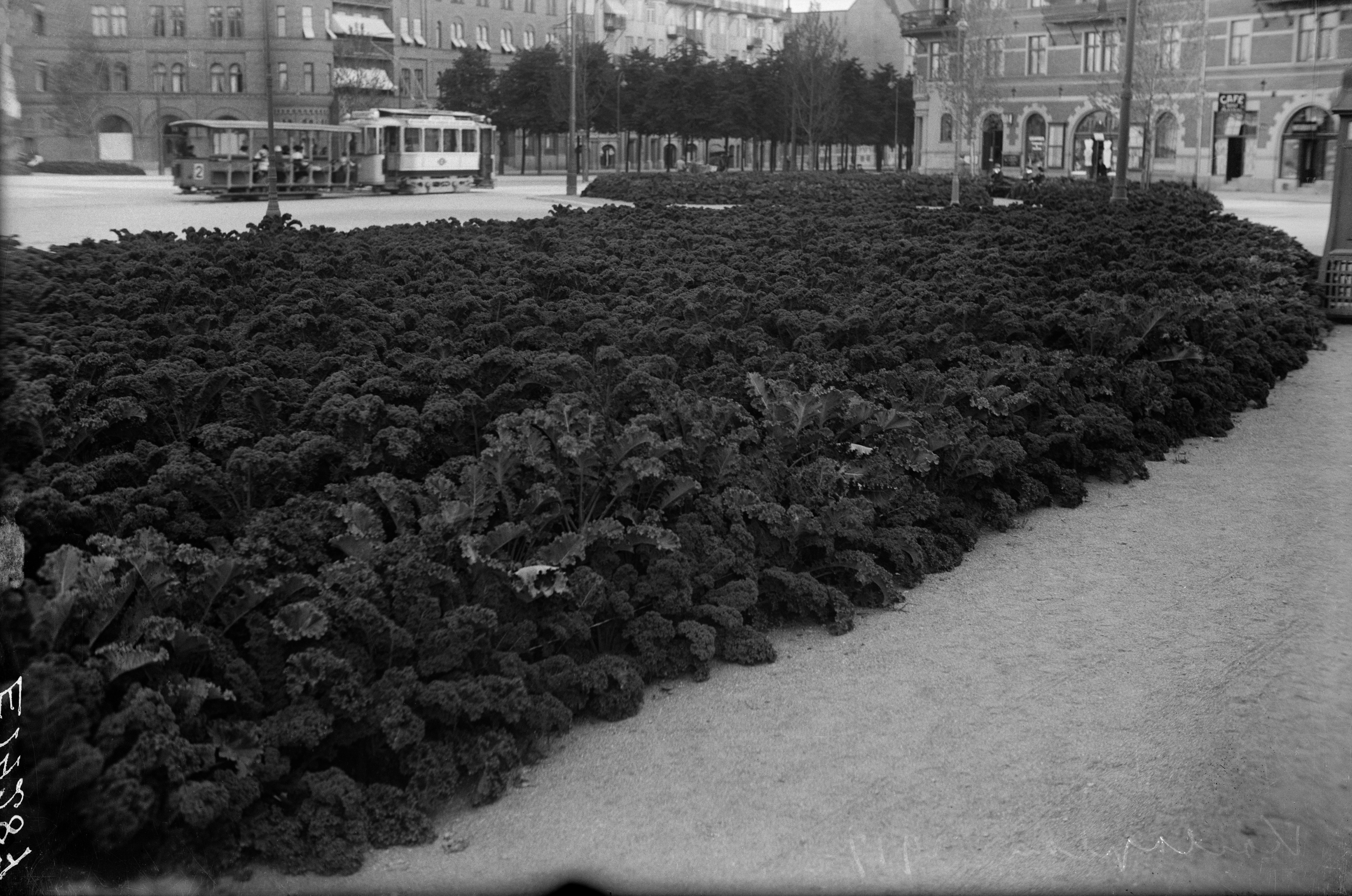 FOTOGRAFIKålodling i Karlaplans blomsterrabatter under första världskriget. 1917-1917FOTOGRAF: Malmström, Axel.BILDNUMMER: E 14287Stadsmuseet i Stockholm Stockholms stadsmuseum Bildnummer SSME014287